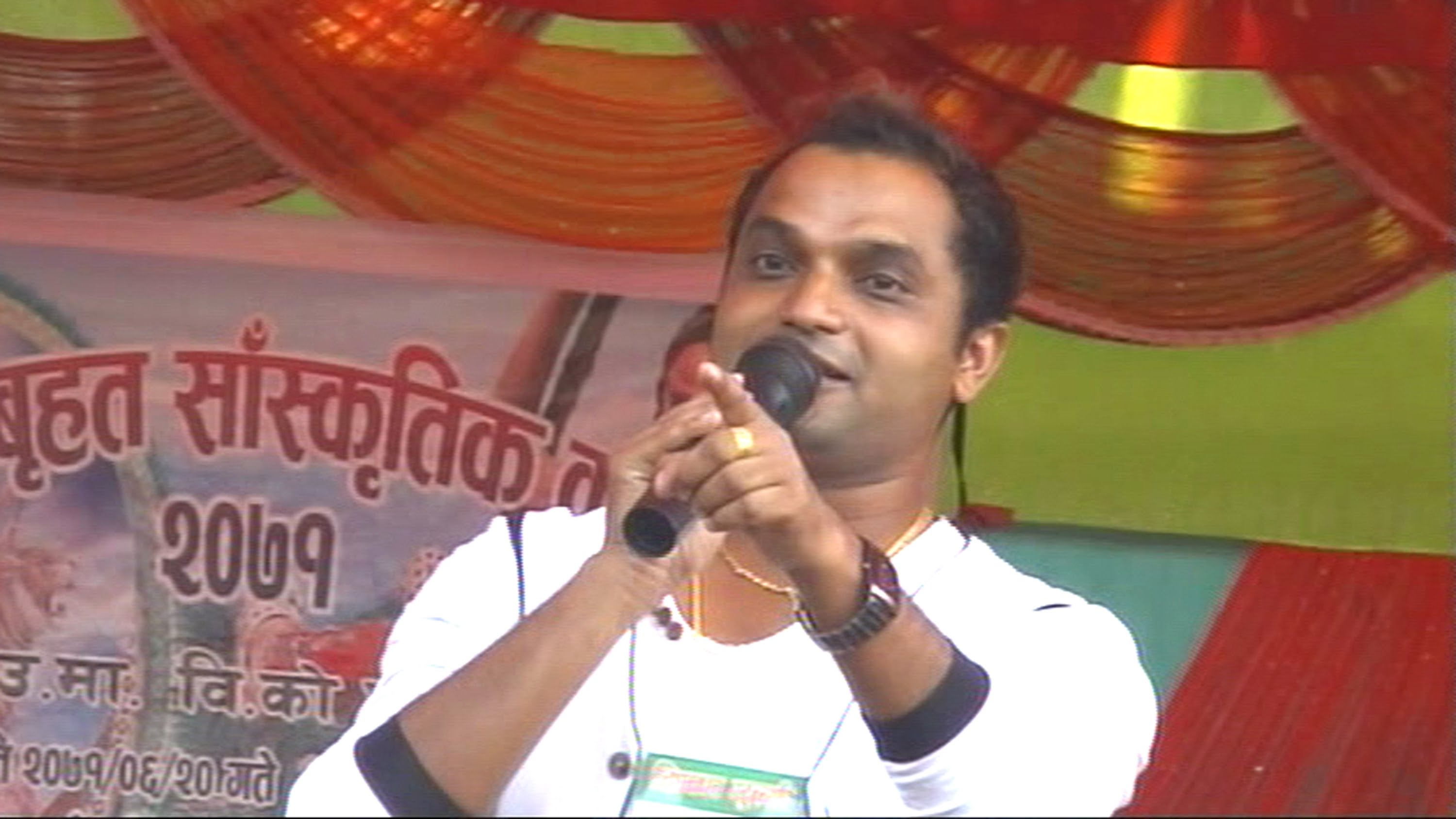 नेपाली: पशुपती शर्मा गीत गाउदै।